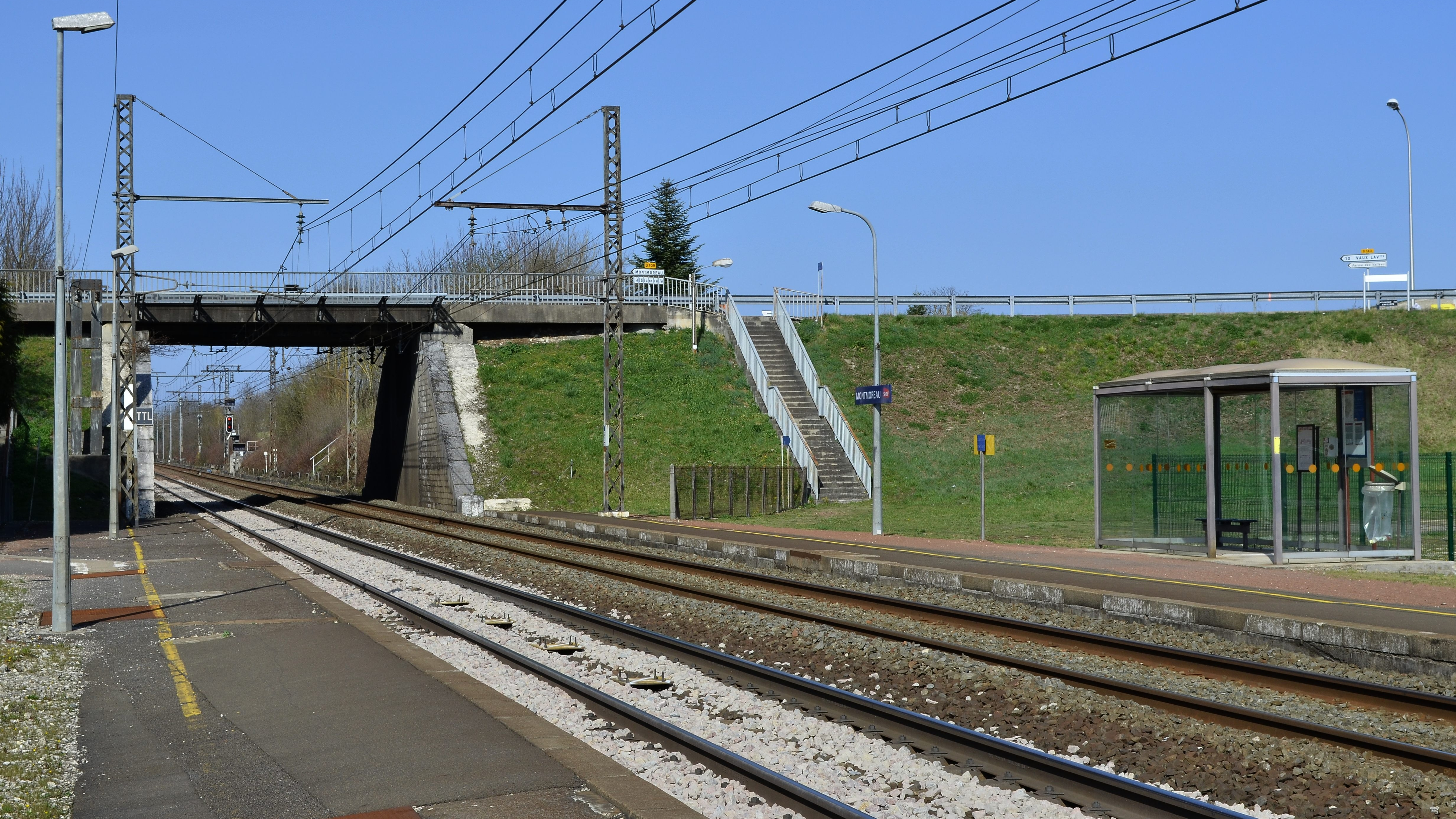 Gare de Montmoreau-Saint-Cybard, Charente, France. Cet emplacement est en fait situé sur la commune de Saint-Amant.